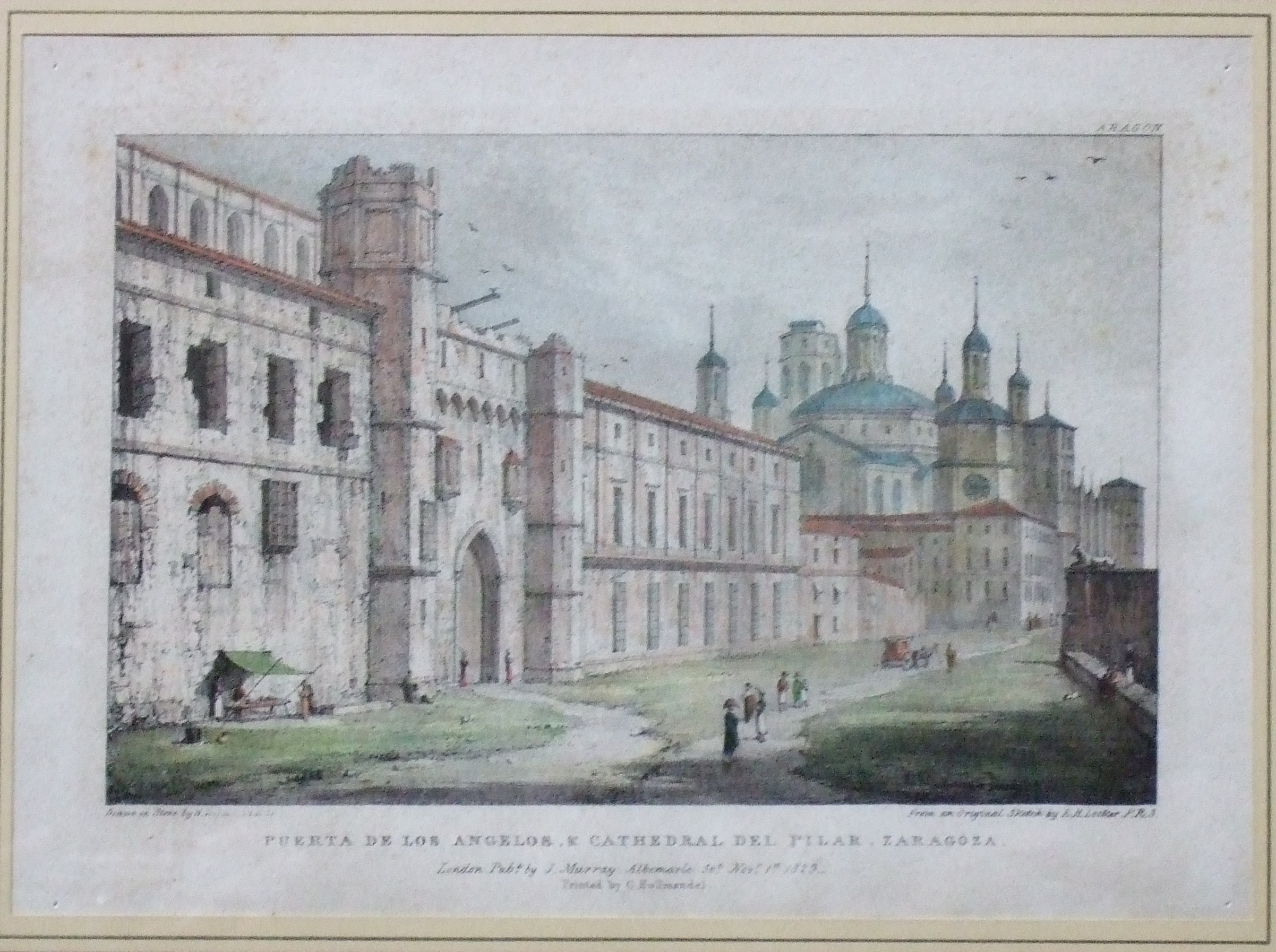 Puerta del Ángel y templo de Nuestra Señora del Pilar (1813-1924) Autores Edward Hawke Locker (dib.) y William Westall (lit.) Colección Alejandro Rincón, Zaragoza